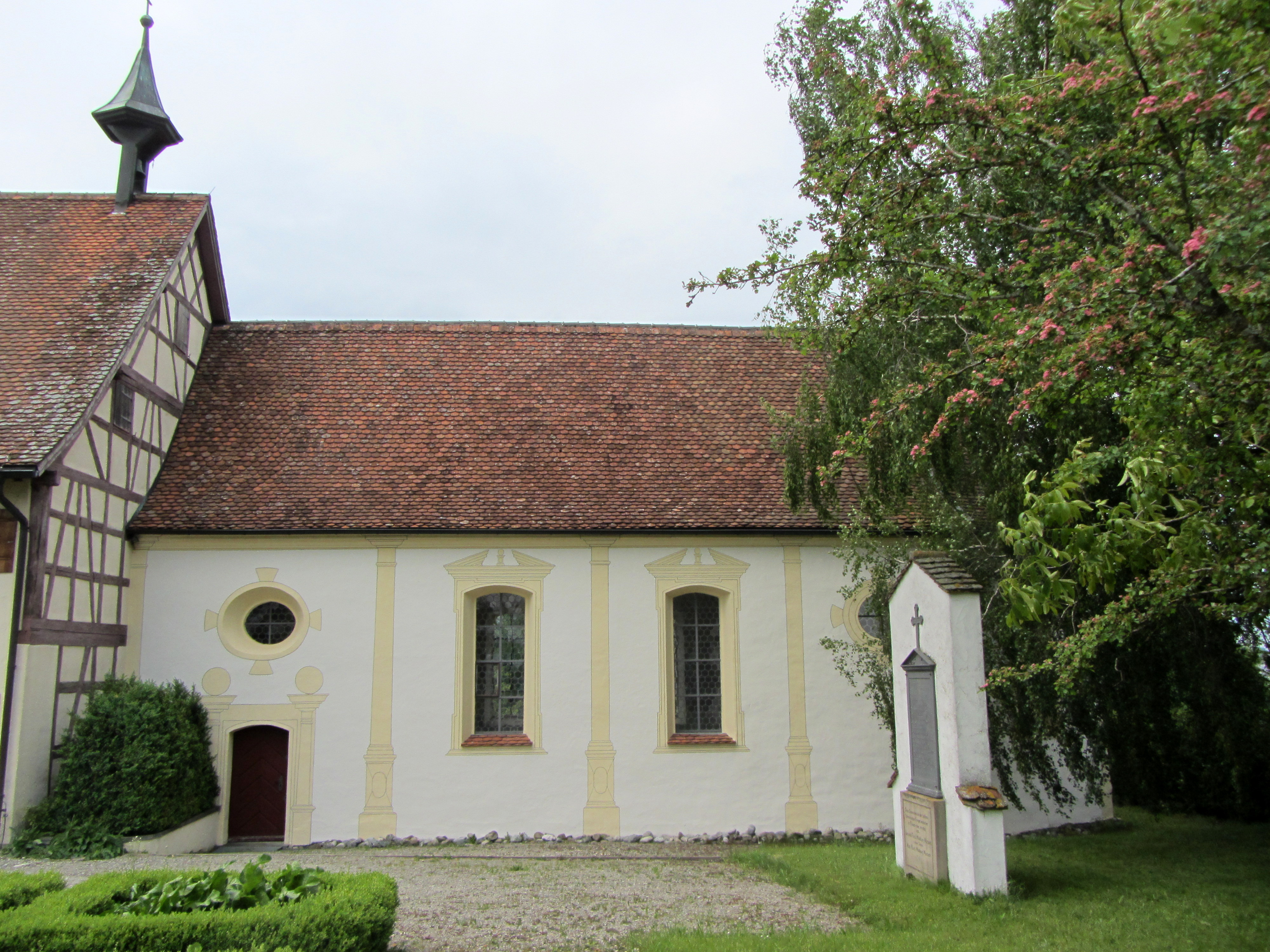 Leprosenkapelle